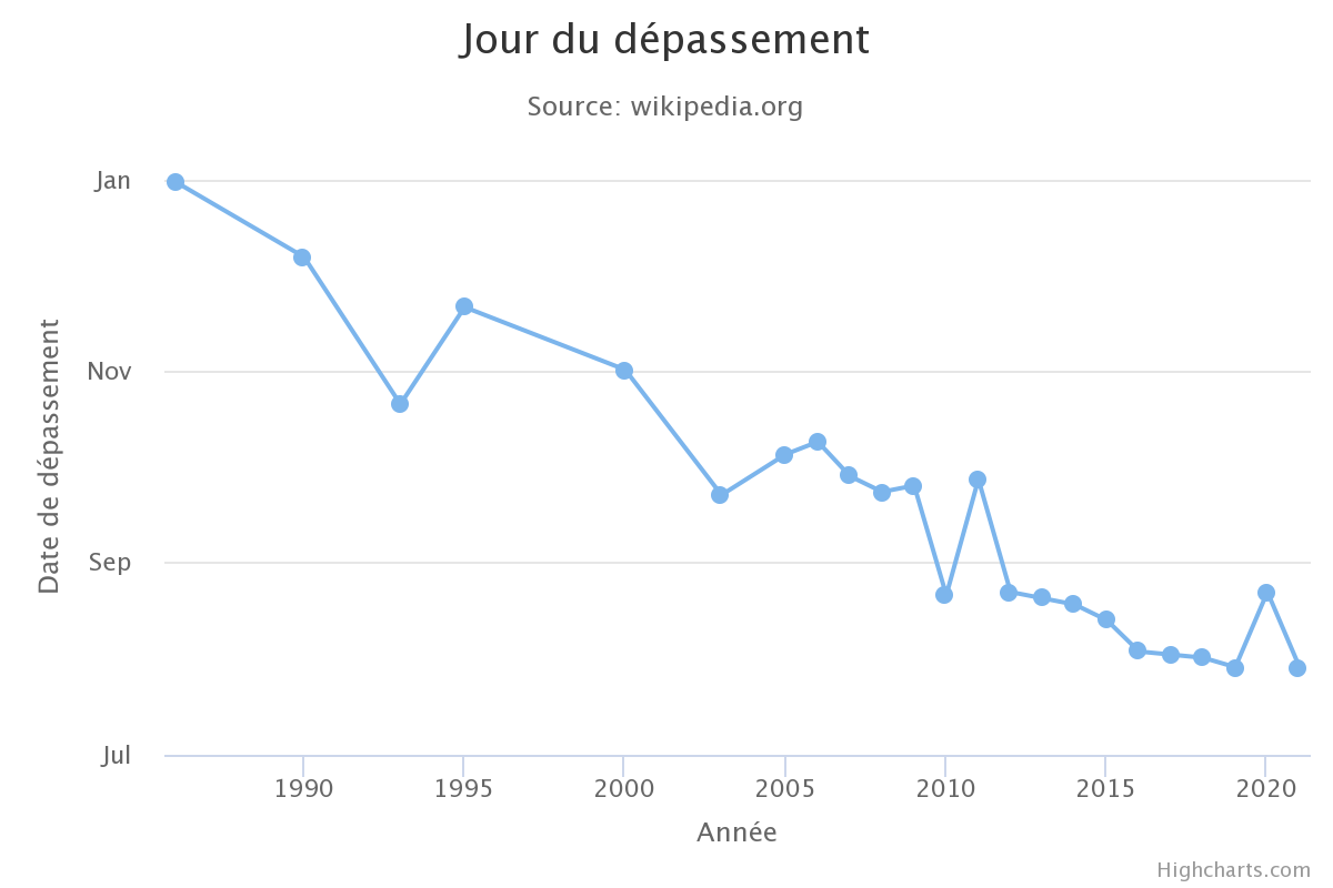 Jour de dépassement par graphique, modiafiable ici